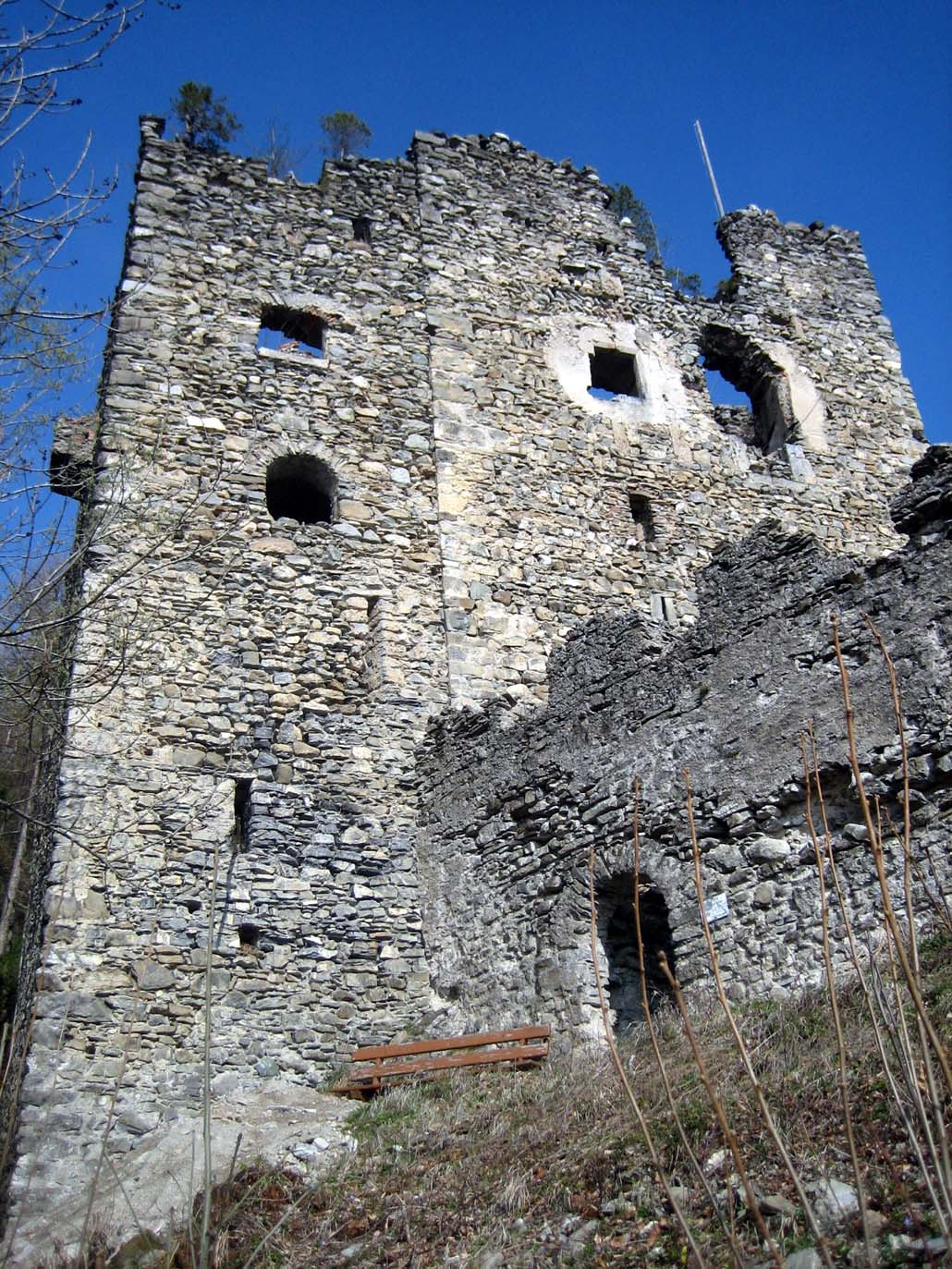 Aspermont von Westen